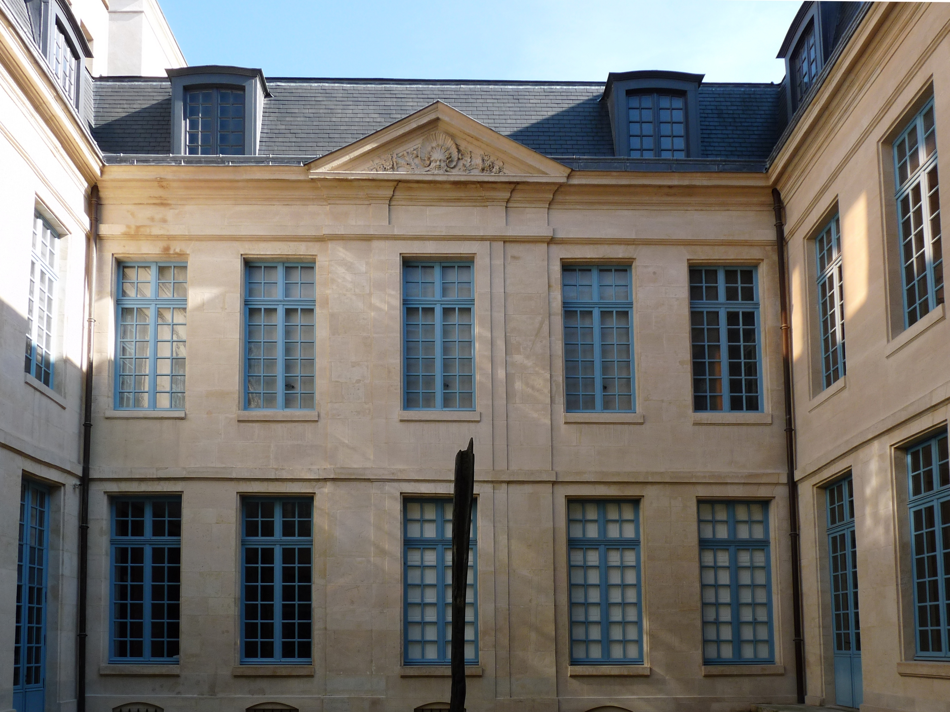 L'hôtel de Mongelas, côté cour